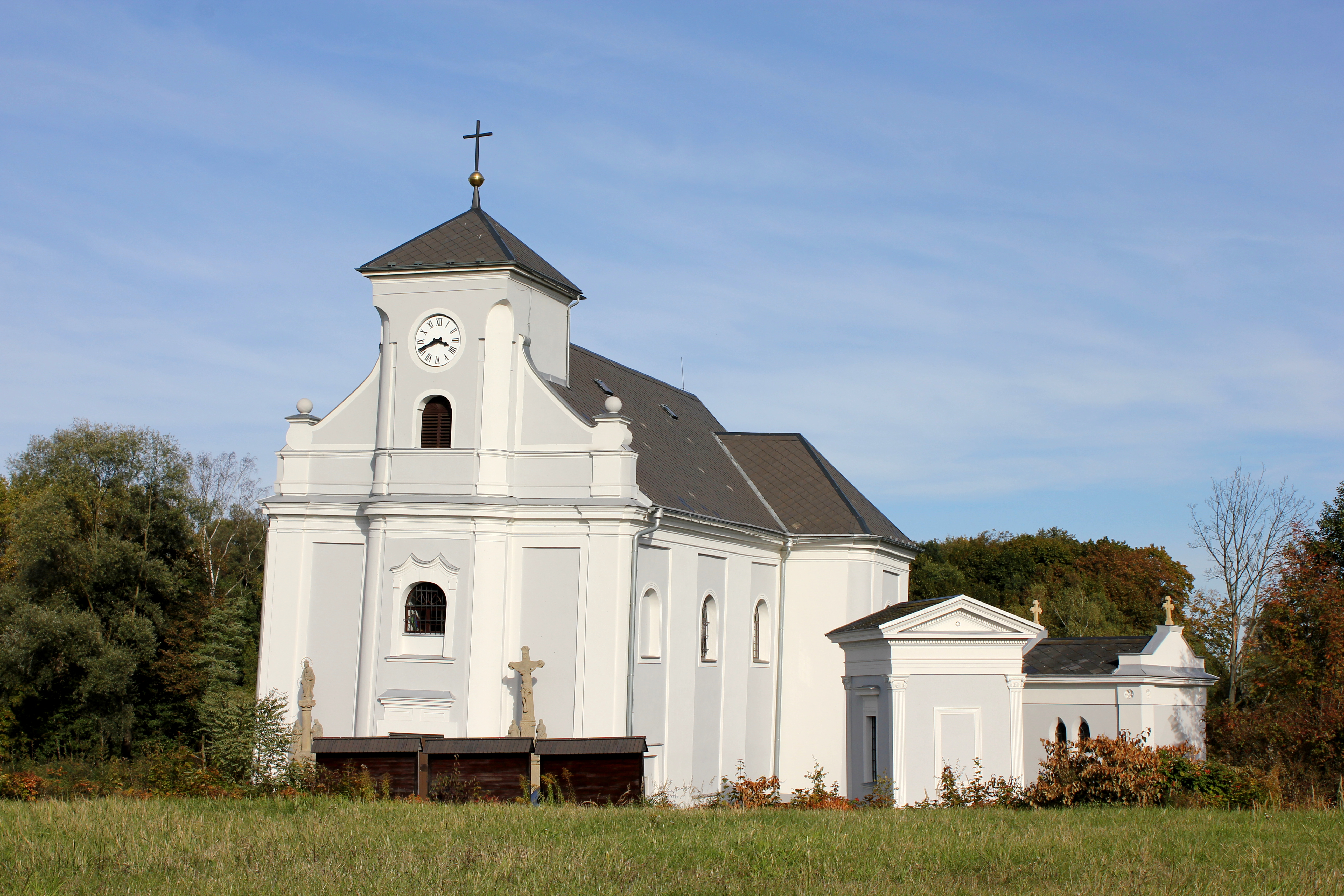 Kostel sv. Petra z Alkantary, Karviná-Doly.